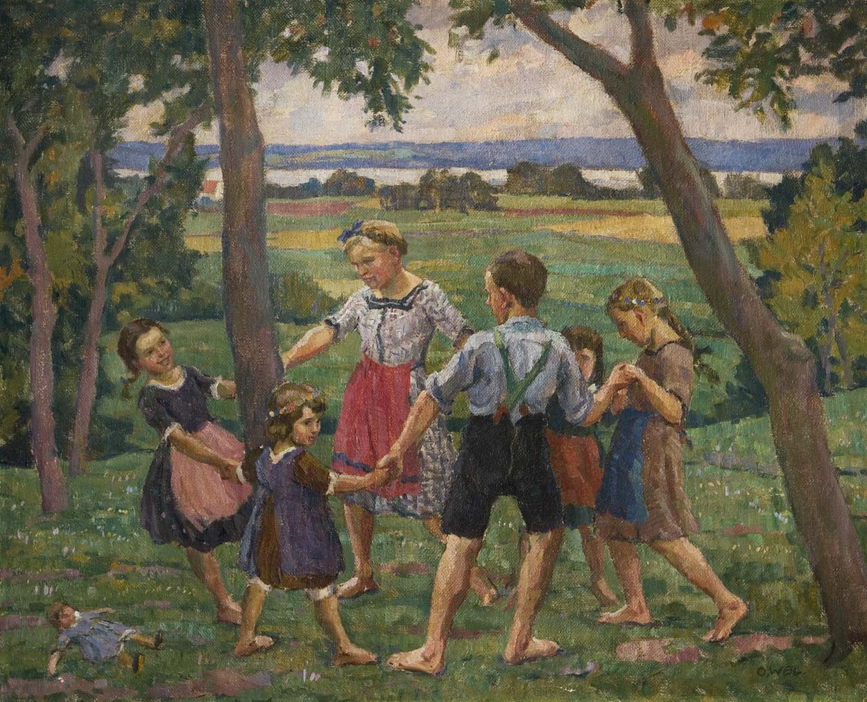 "Ringelreihen", Öl auf Leinwand, signiert, 90 x 112 cm